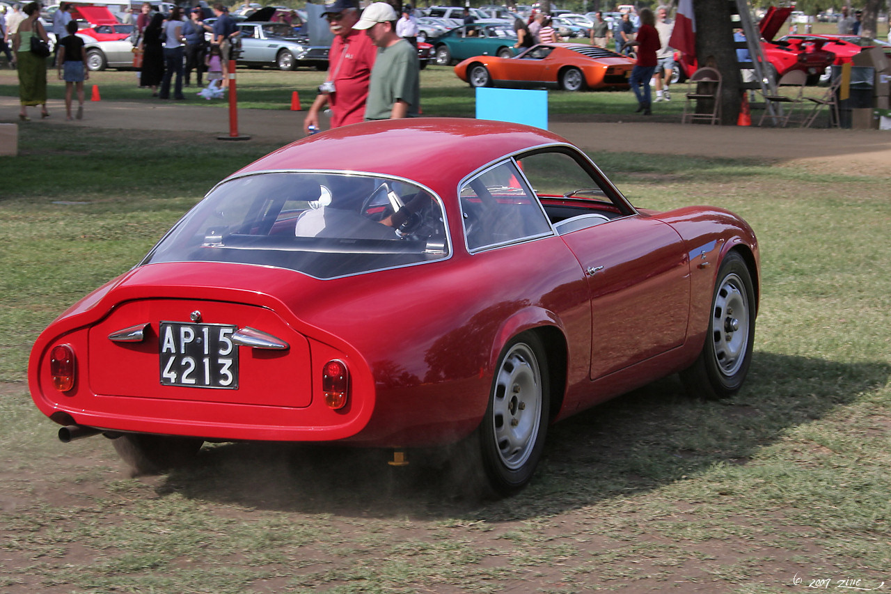 1962 Alfa Romeo Giulietta SZ-2 - red - rvr2